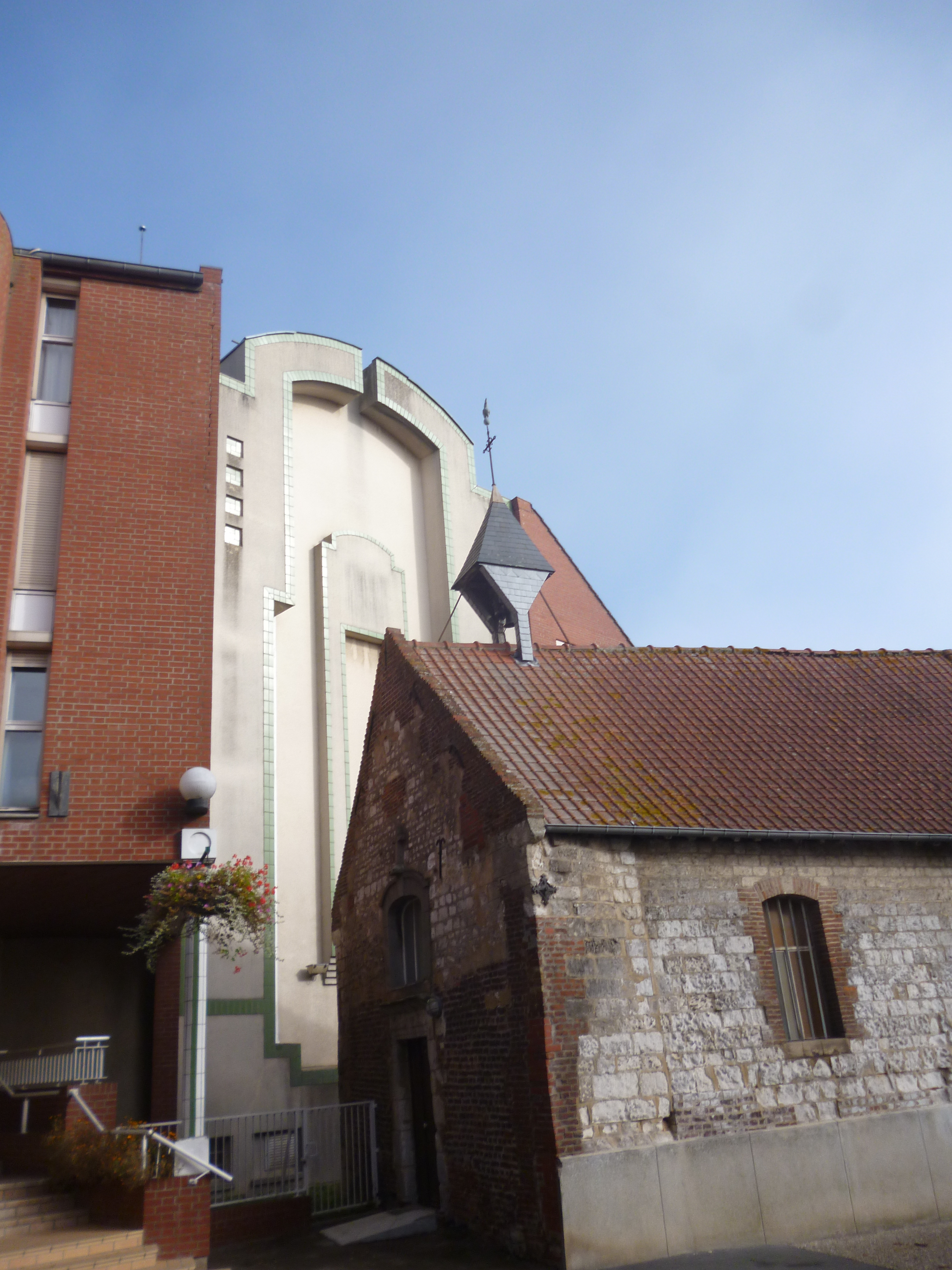 La chapelle de la comtesse de Montmorency, située à Breteuil (Oise), avec la maison de retraite en arrière-plan.